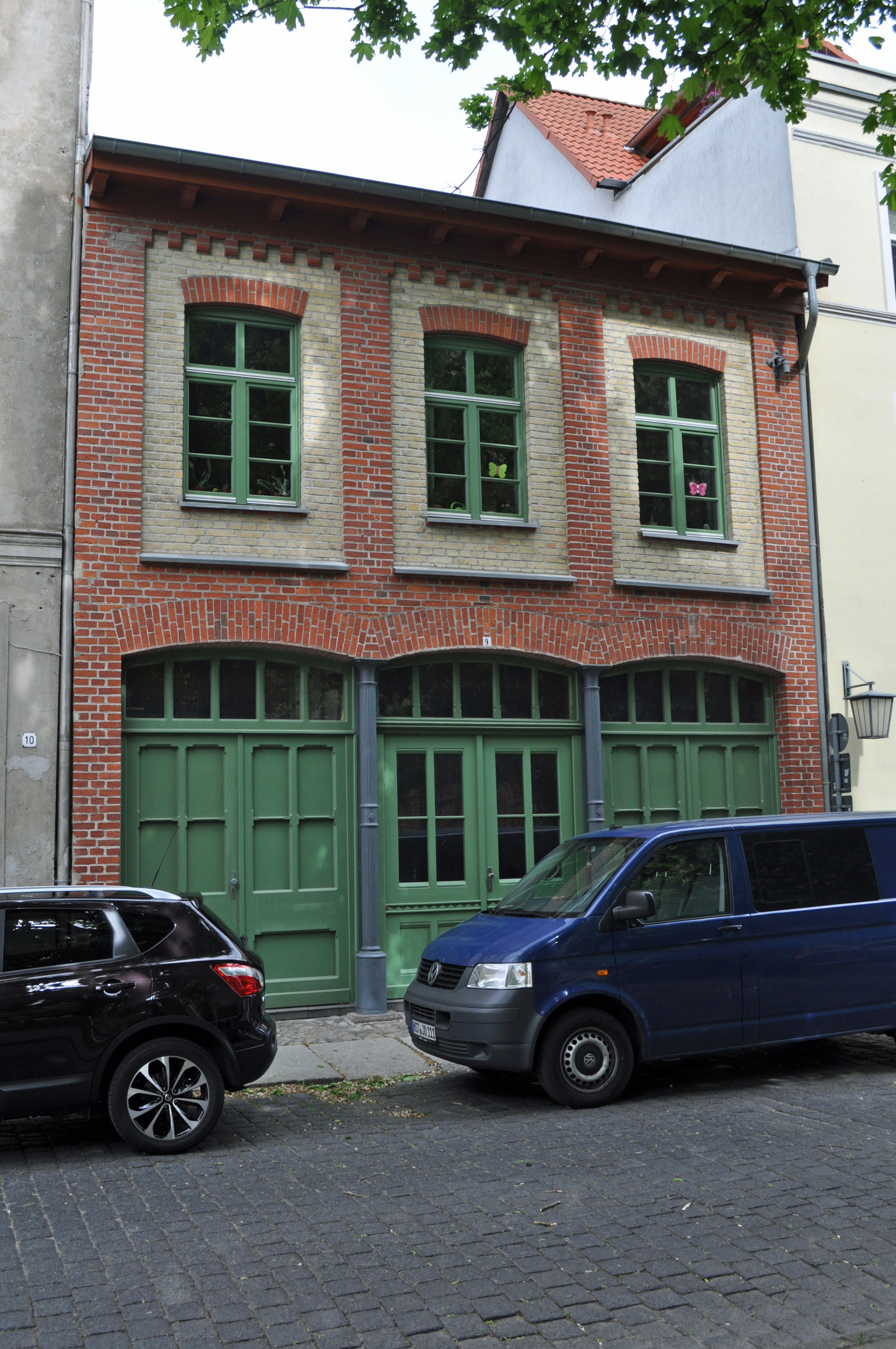 Gebäude in Stralsund, siehe Dateiname